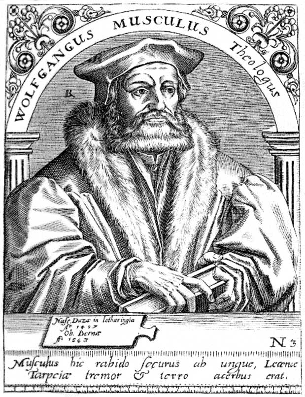 Kupferstich Wolfgang Musculus oder Musculus, Wolfgang (1497-1563); Theologe